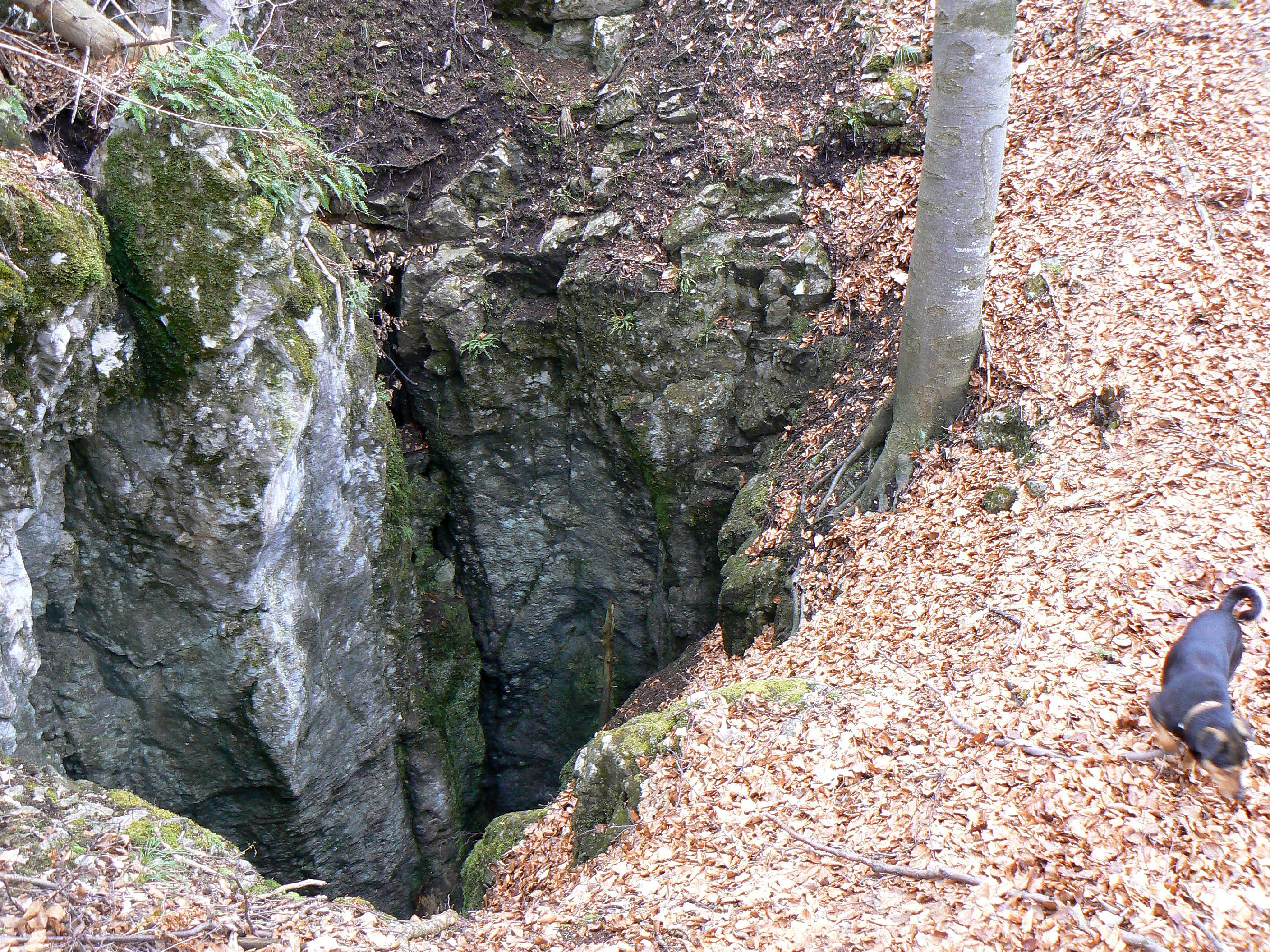 Vlčie hrdlo. Relikt senilnej stráňovej koróznej priepasti je situovaný v severnej stráni planiny, kde sa nachádza pomerne málo zvislých jaskýň.